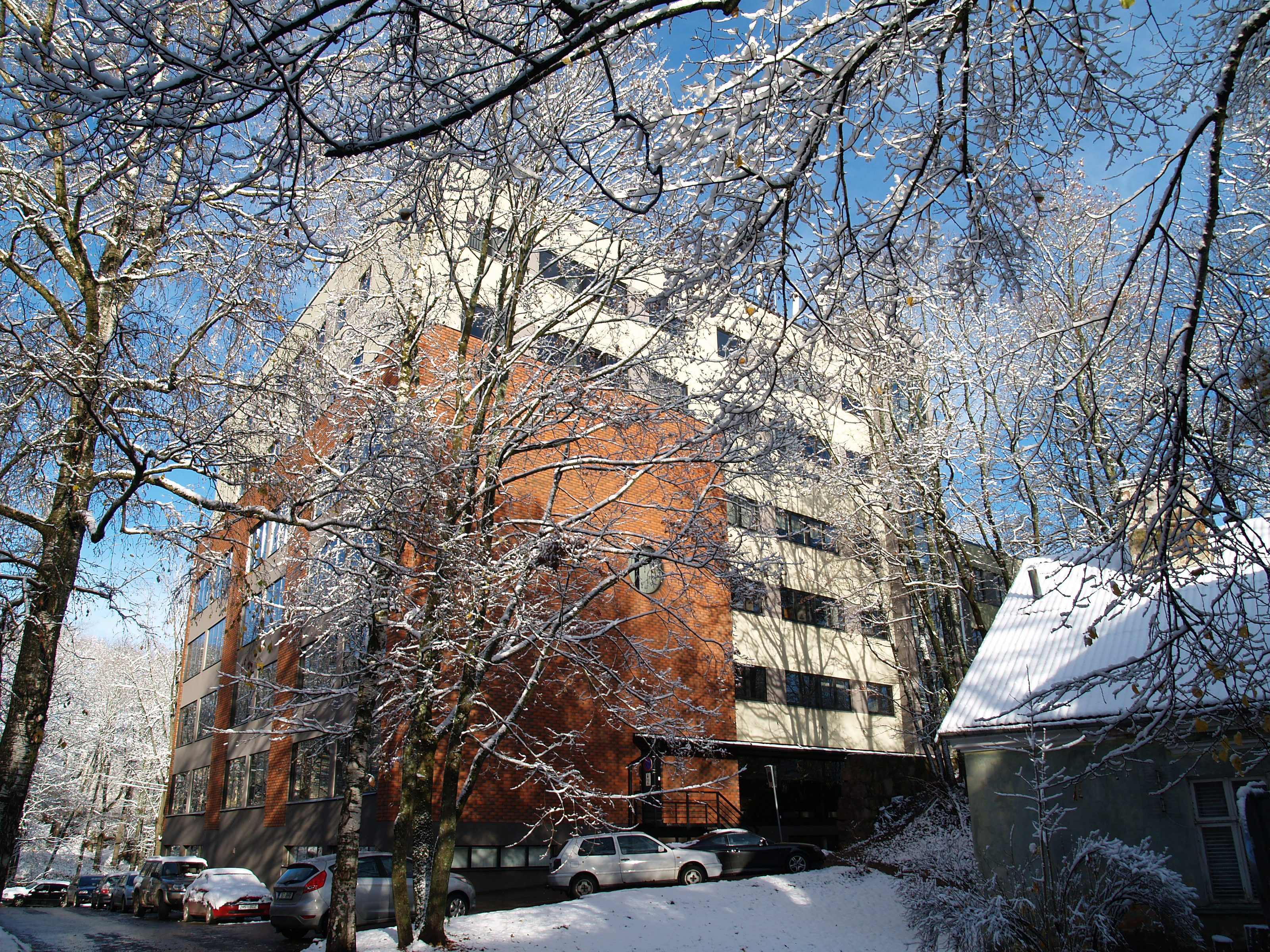 Tartu Ülikooli matemaatika-informaatikateaduskonna hoone aadressil Liivi 2.